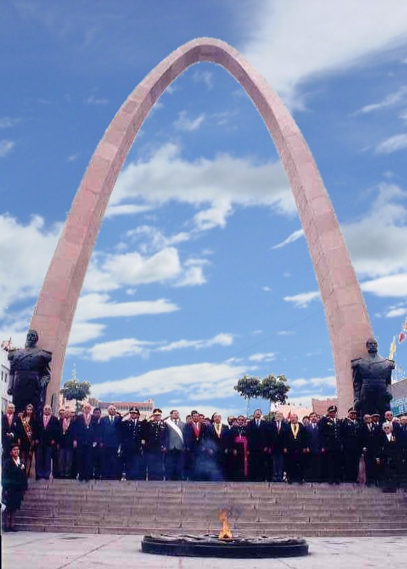 Tacna Arco Parabolico. Publicado en